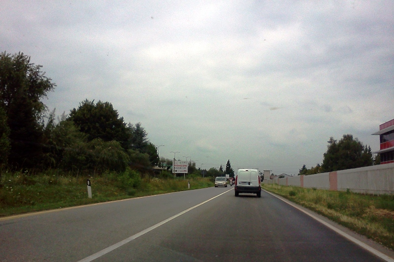 La ex SS 233 Varesina nel territorio di Origgio